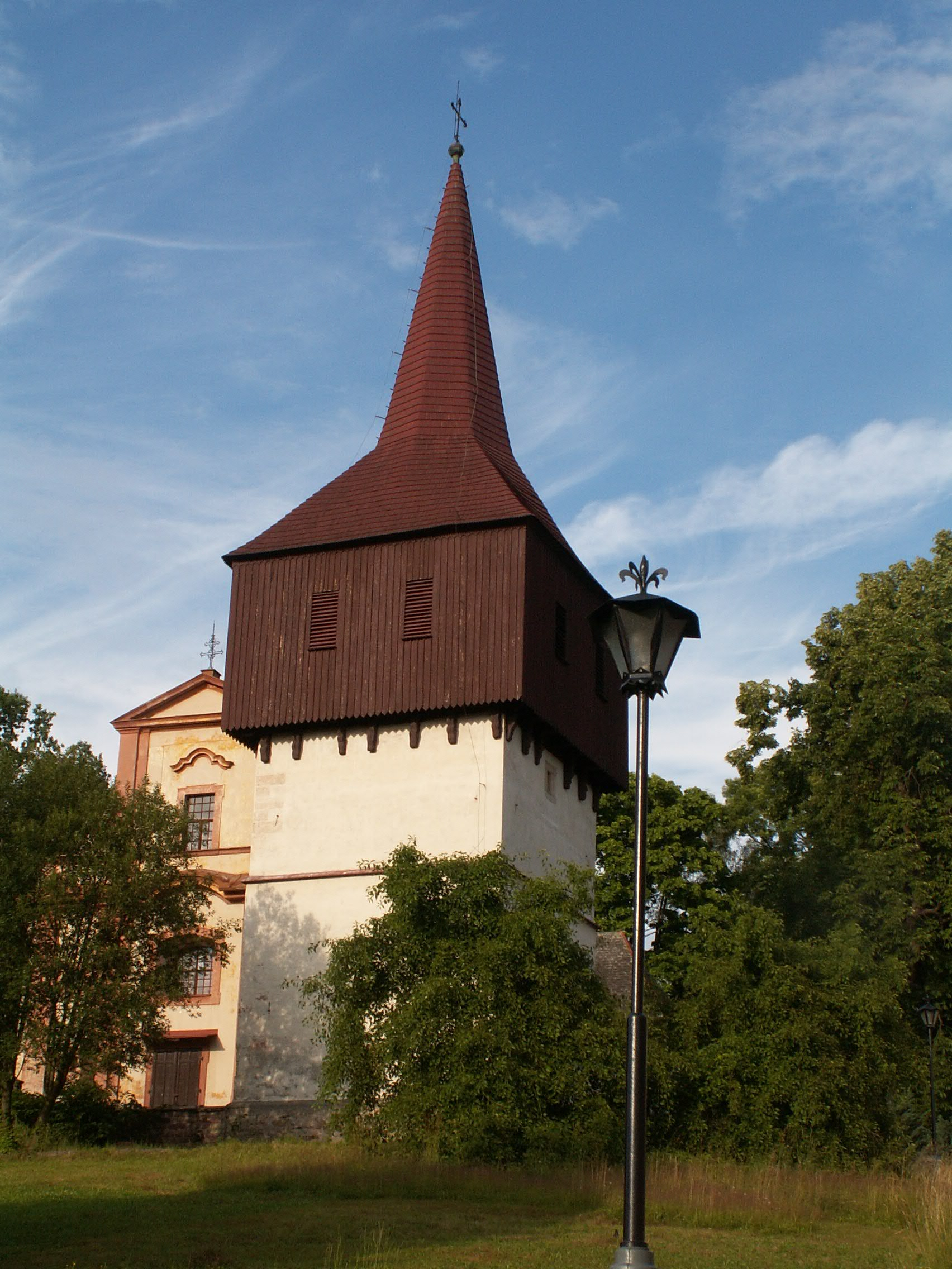 Kostel Všech svatých (Hronov), Hronov